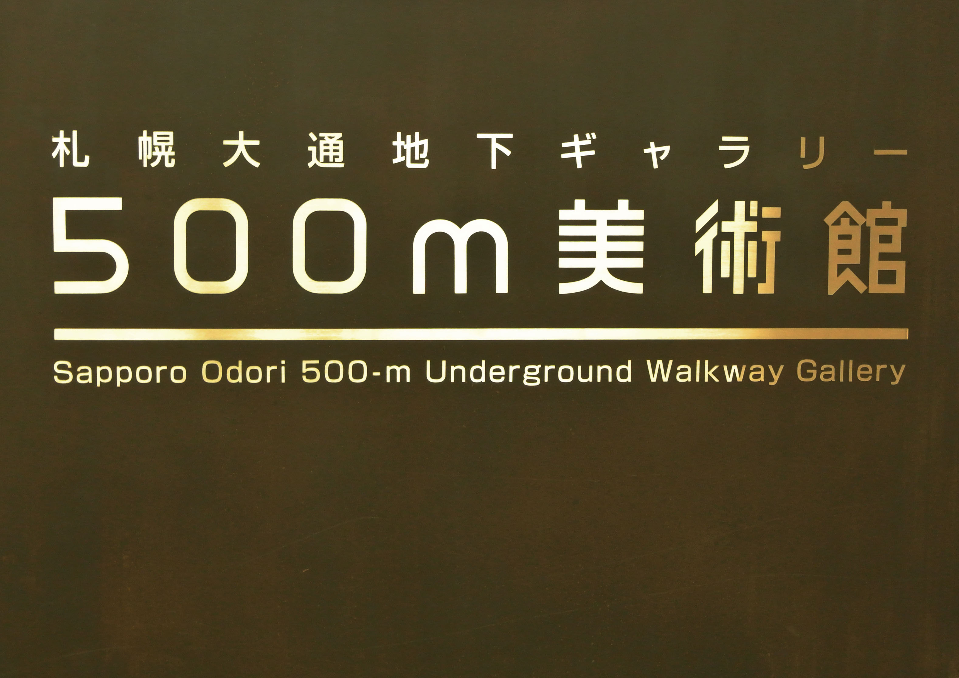 500m美術館のロゴ